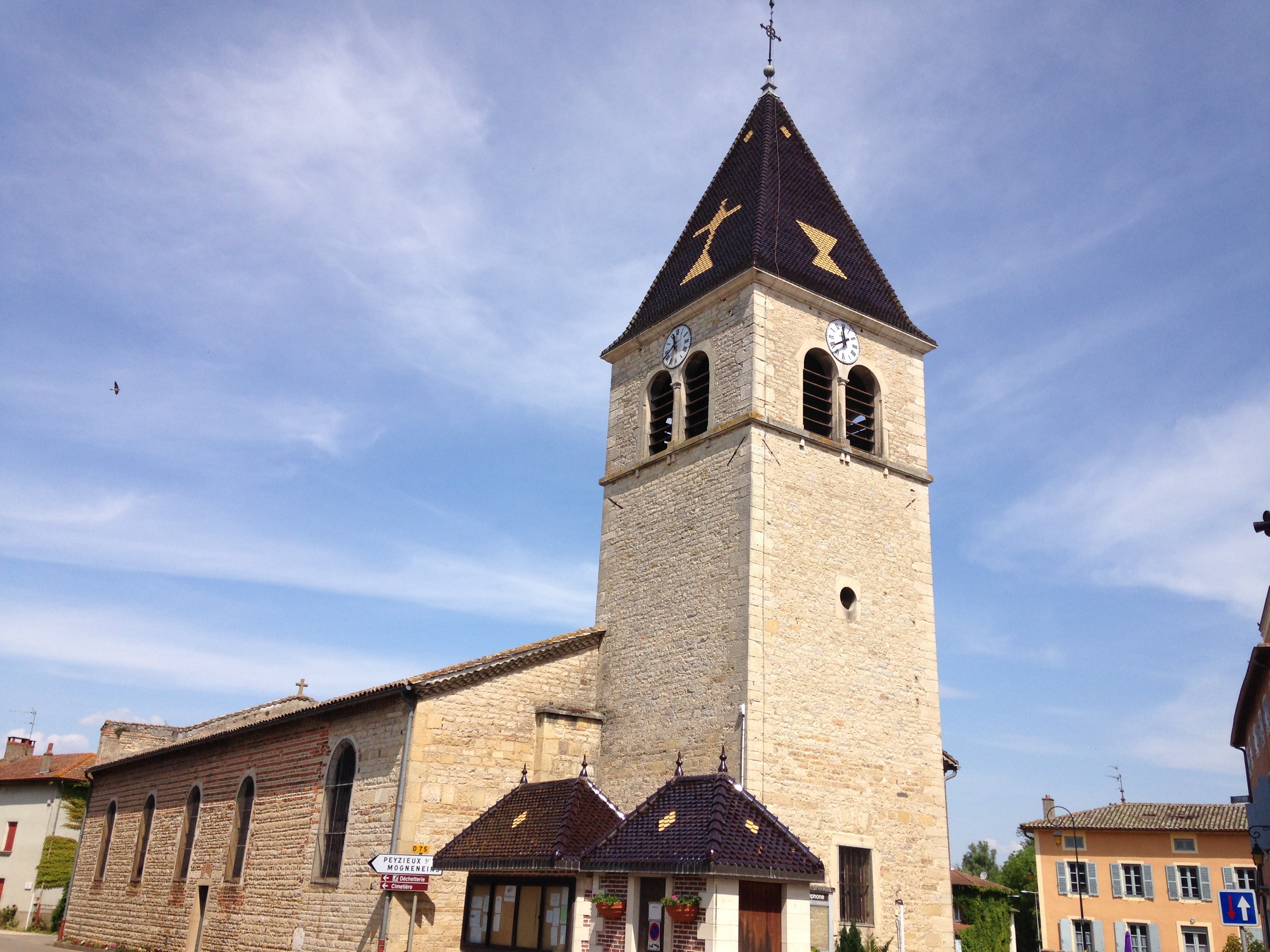 Vue de l'église de Saint-Etienne-Sur-Chalaronne depuis le carrefour du centre.